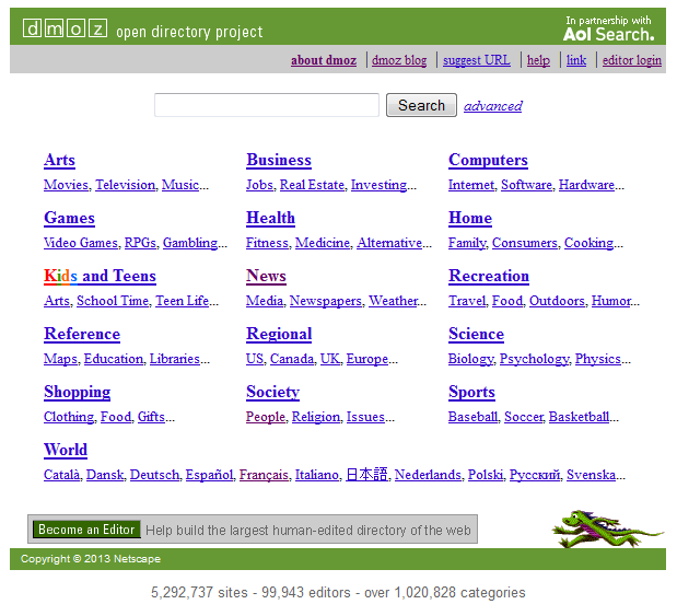 Page d'accueil du répertoire DMOZ